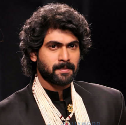 Rana Daggubati walk the ramp for Moni Agarwal at IIJW 2013